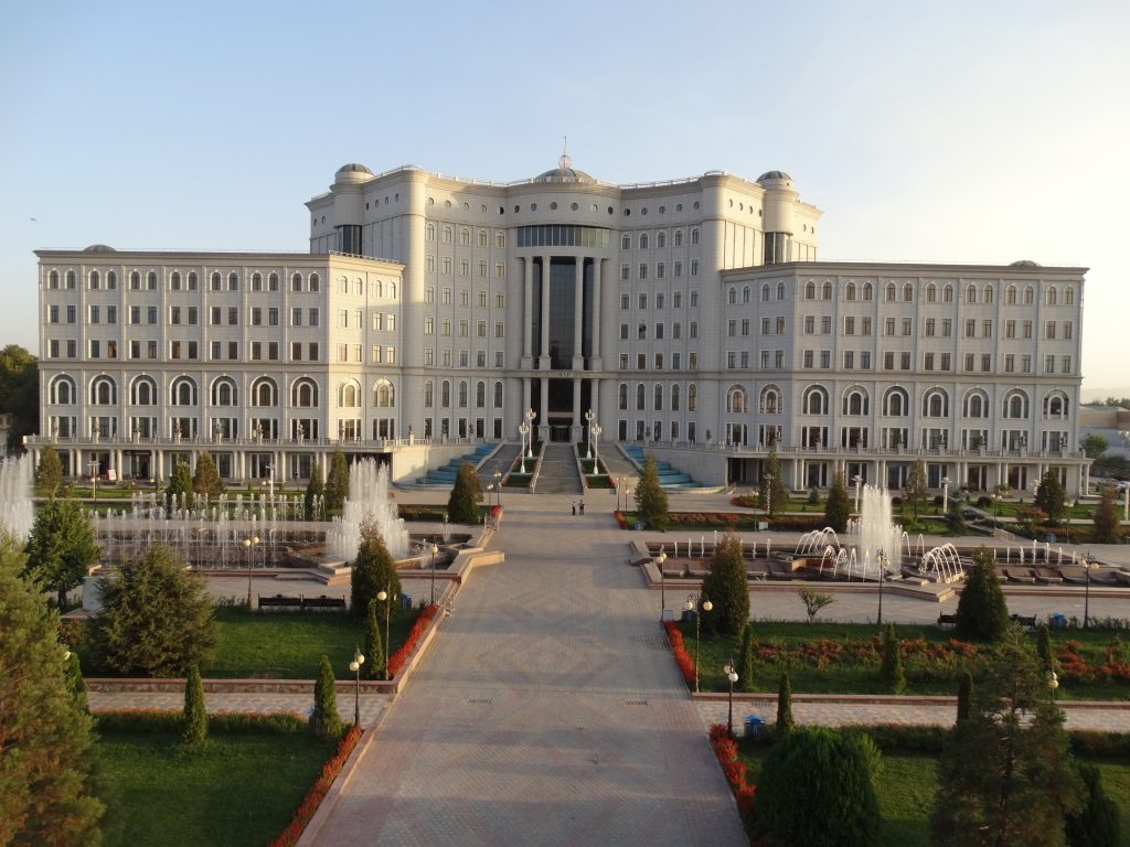 Национальная библиотека Таджикистана, г. Душанбе, Таджикистан